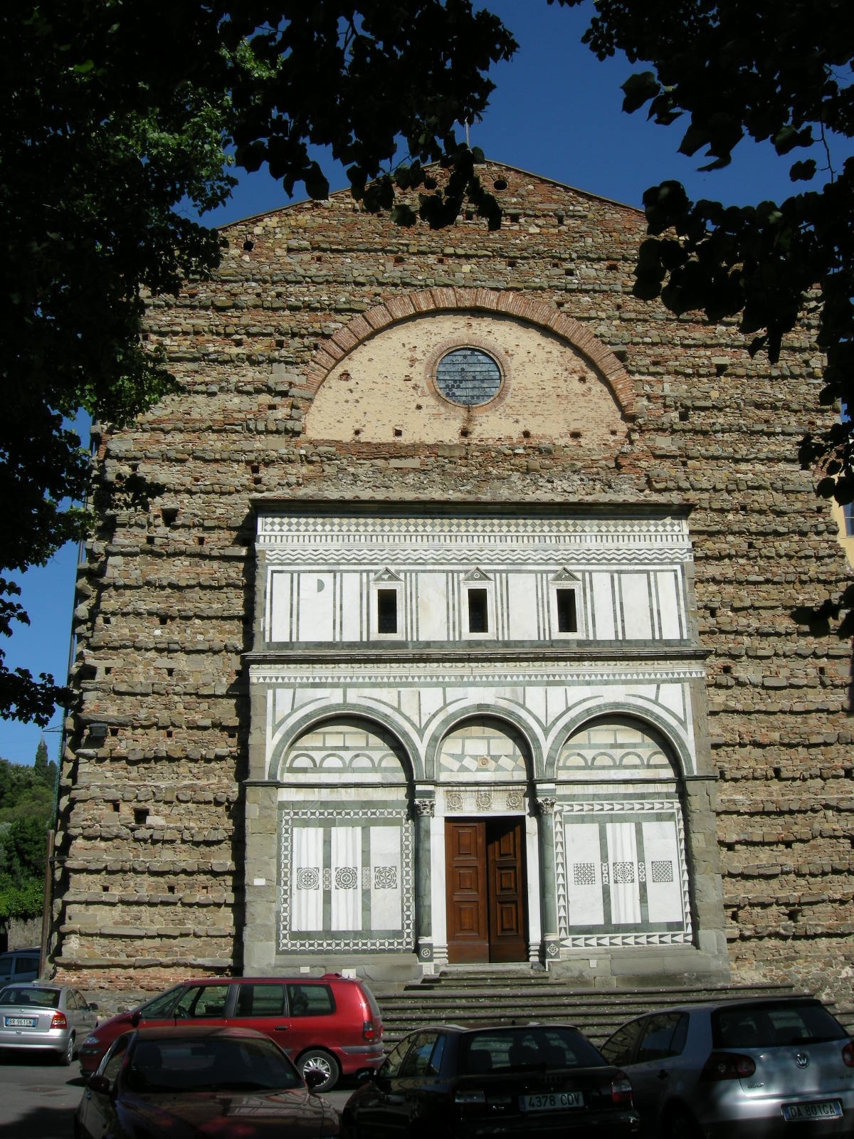 Badia fiesolana, facciata